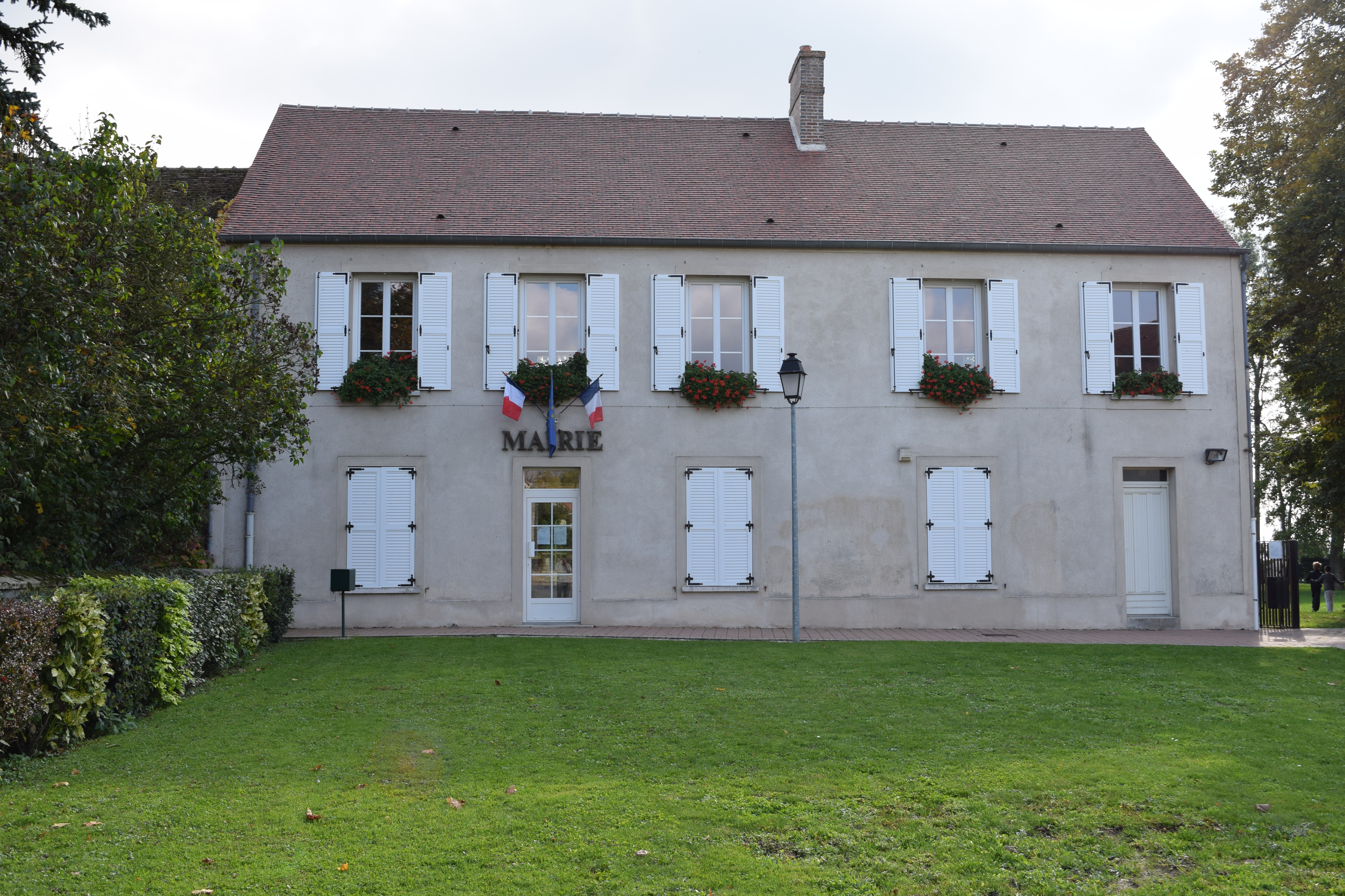 Mairie de Quiers